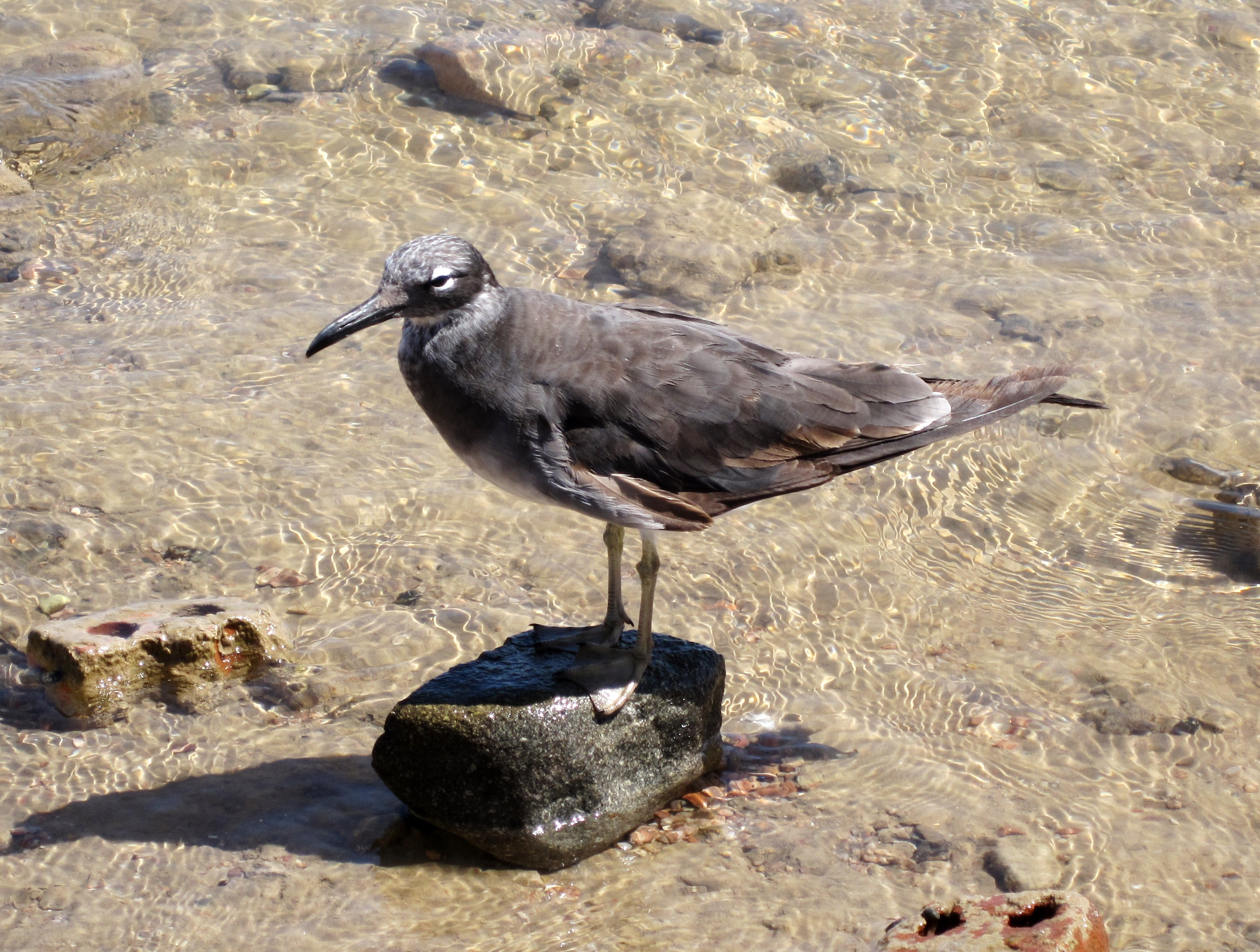 Junge Weißaugenmöwe (Ichthyaetus leucophthalmus) am Ufer des Roten Meeres südlich von Hurghada, Ägypten